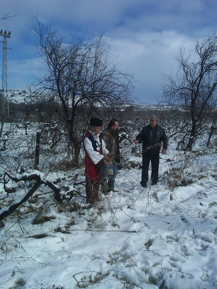 Традиционен обичай "Зарязване" на празника Трифон Зарезан